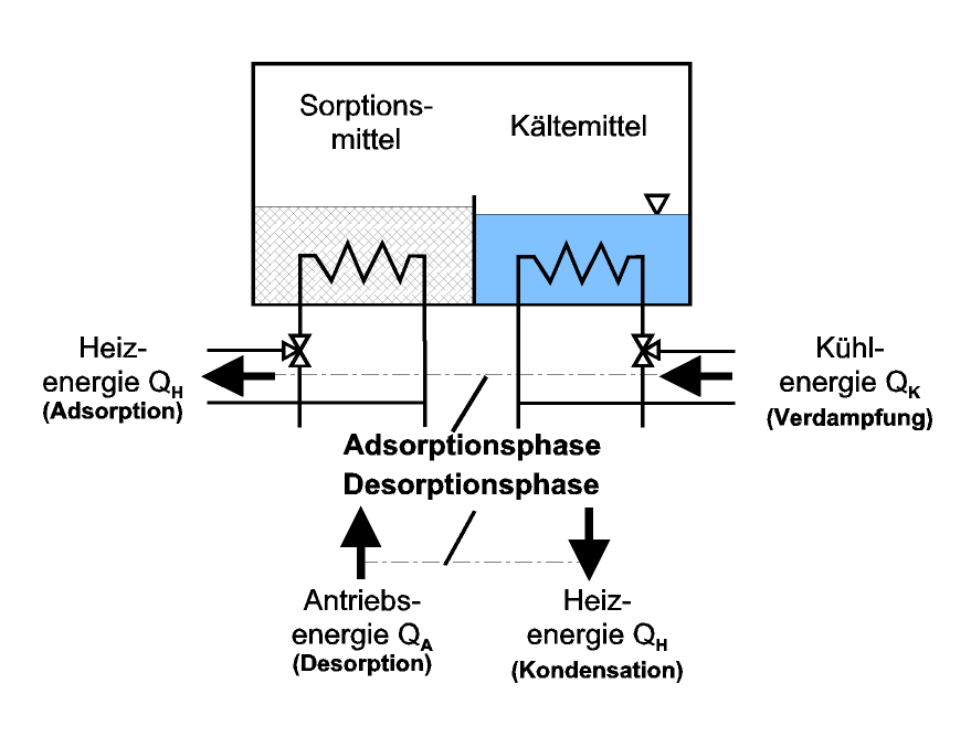 Funktions-Prinzip einer Adsorptions-Kältemaschine